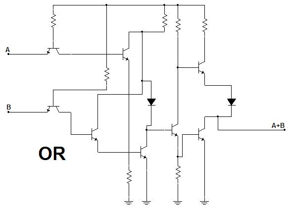 Puerta OR con transistores